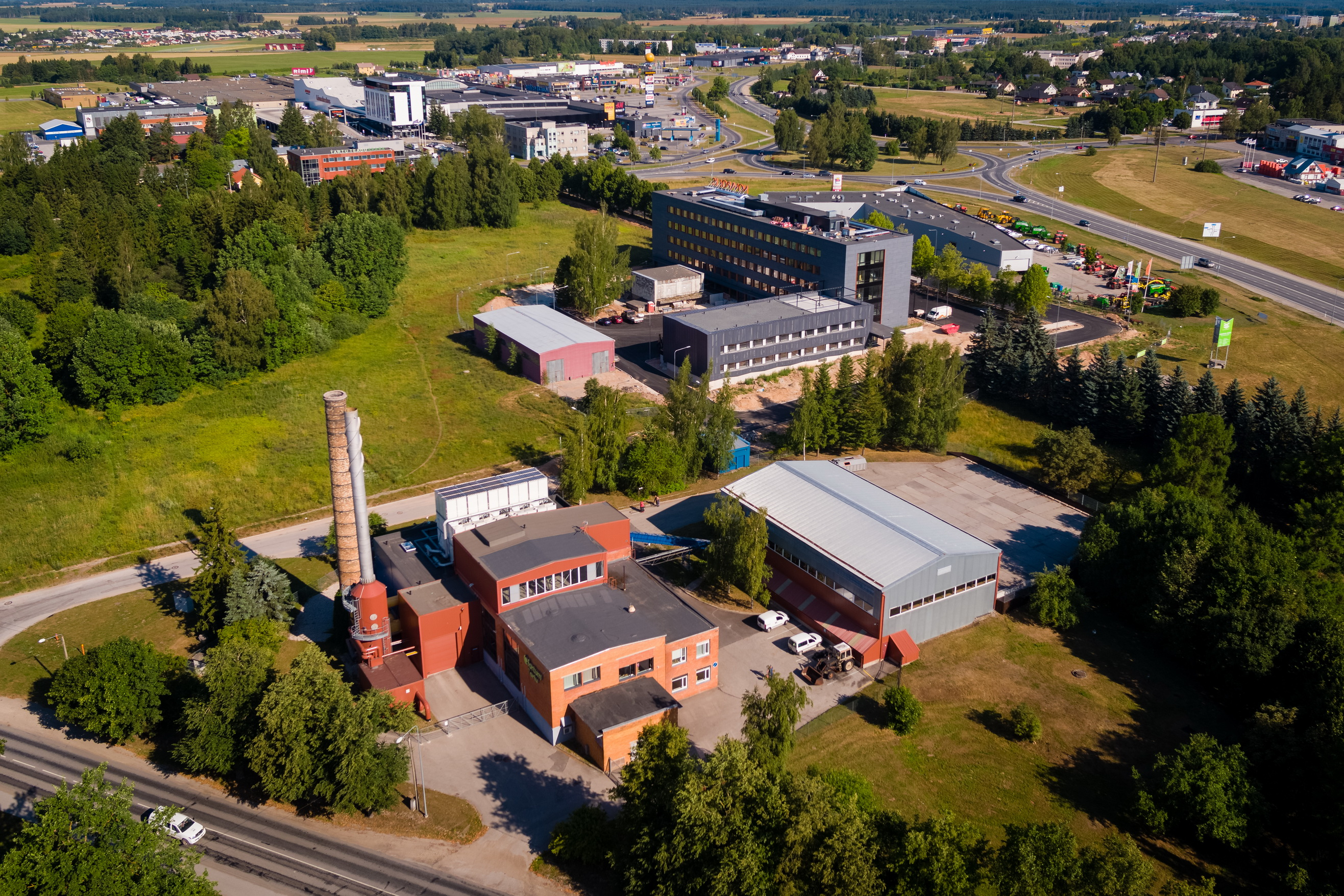 Aardla Külmajaam